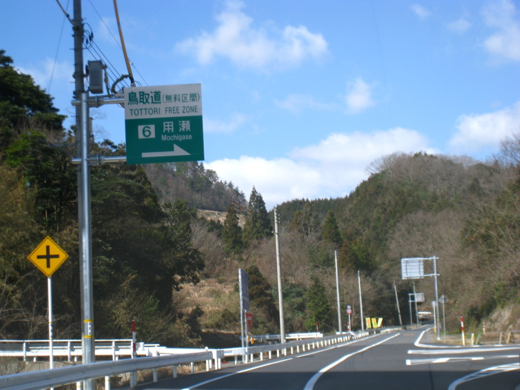 用瀬インターチェンジの案内板